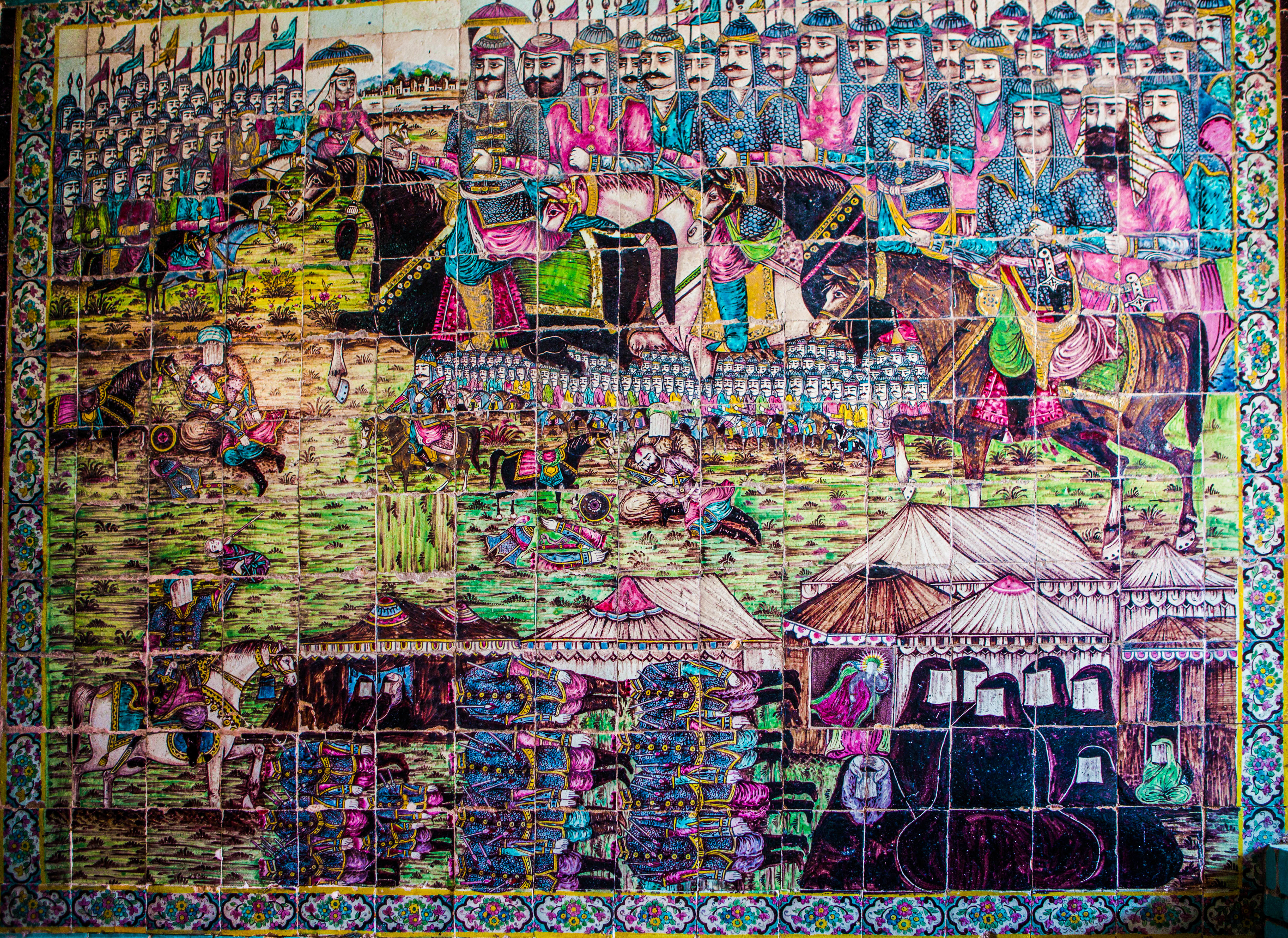 کاشیکاری «صحنه ی جنگ امام حسین و یزیدیان در صحرای کربلا ( ظهر عاشورا )» از جمله کاشیکاری‌های موجود در تکیه معاون‌الملک کرمانشاه می‌باشد.